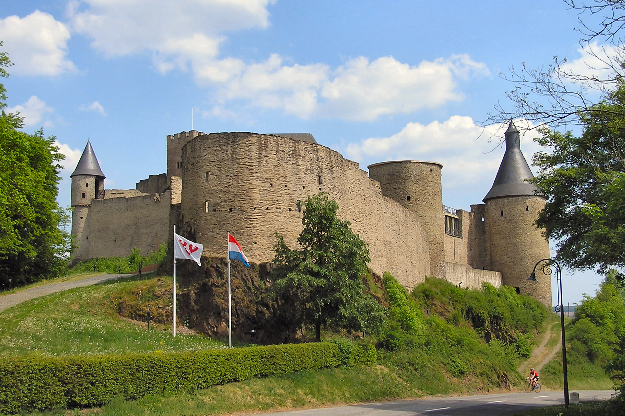 Photo que j'ai prise le 6 mai 2007 BRUNNER Emmanuel (manu25)